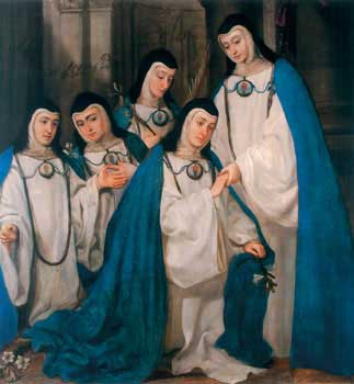 Cinco religiosas concepcionistas franciscanas/